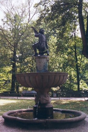 Armbrustschützenbrunnen oder Schnepperschützenbrunnen in der Hallerwiese in Nürnberg-St. Johannis; 1904 von Bildhauer Leonhard Herzog; unter Denkmalschutz